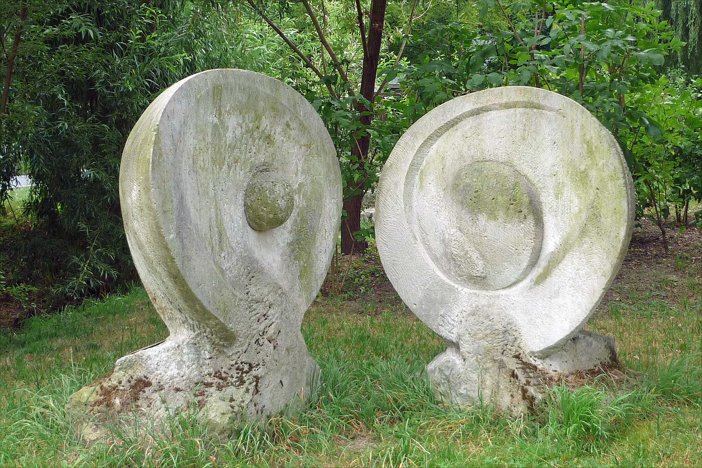 Skulptur Mollusken von Michael Göttsche (1985) in Dresden-Gorbitz, Dahlienweg 20